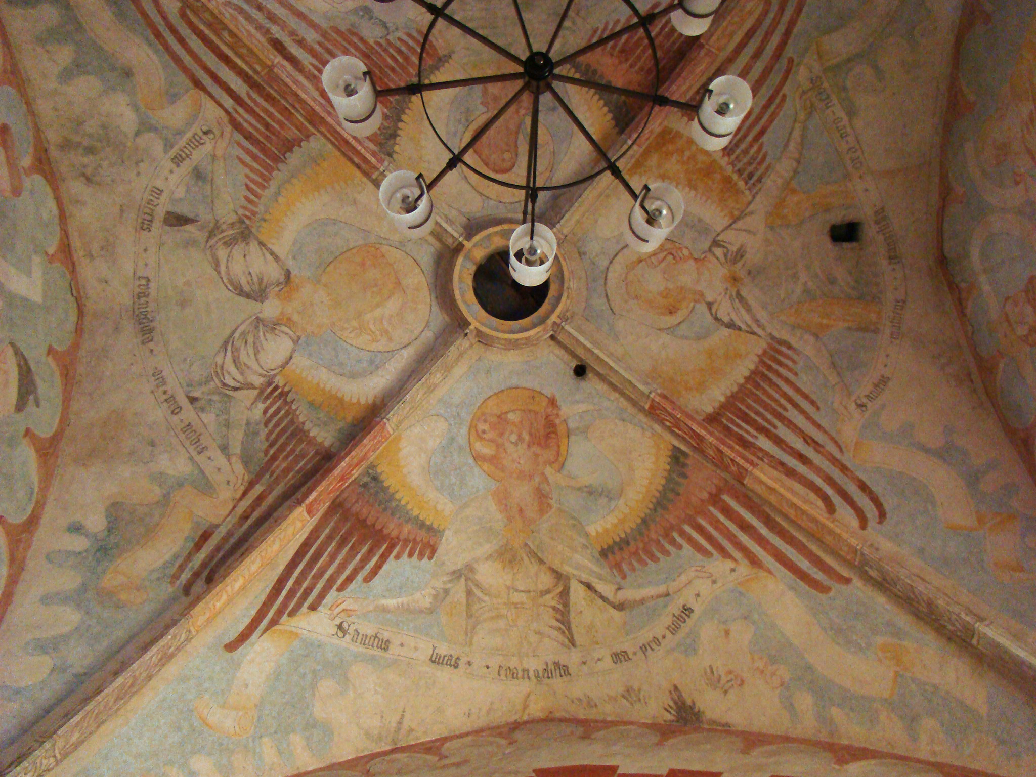 Evangelistensymbole im Deckengewölbe der Ersheimer Kapelle